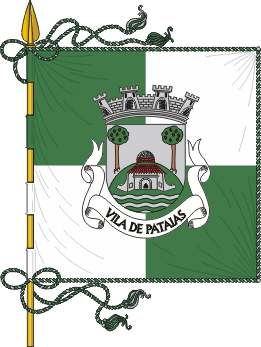 Bandeira Pataias